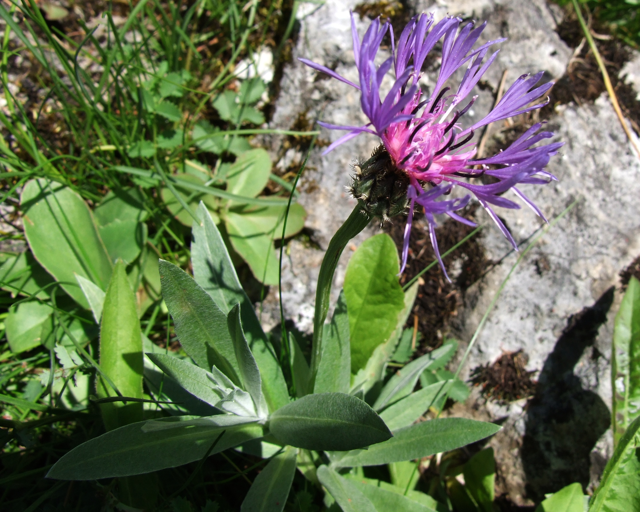 Centaurea triumfetti (habitat:Pieniny)